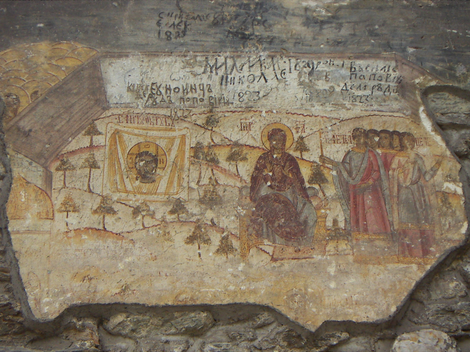 Biserica "Sf. Treime" a Mănăstirii Prislop, din satul Silvaşudesus; 129 la 3 km V de sat oraş Haţeg, construită în 1564, fragmente de pictură murală din 1759